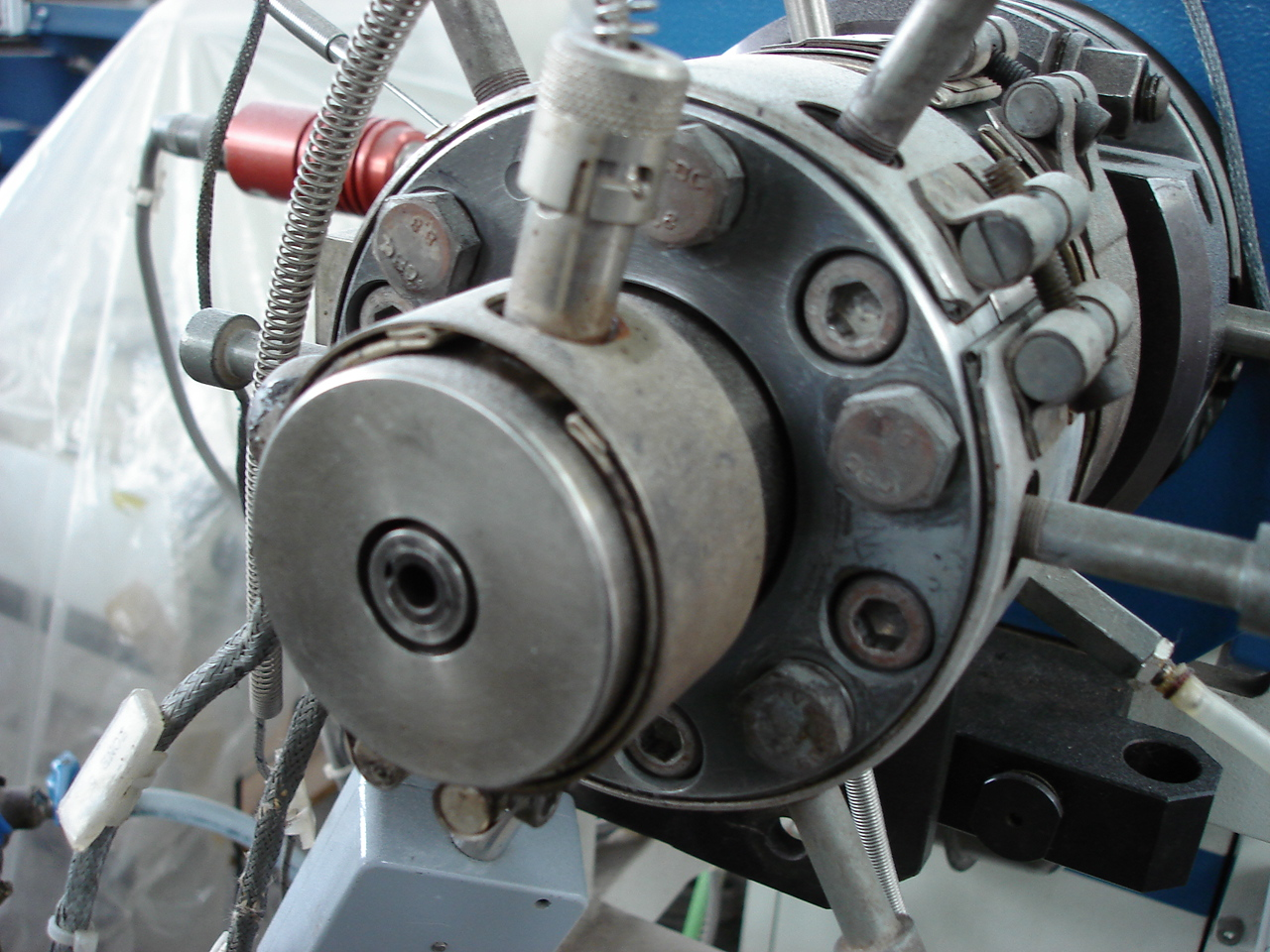 Boquilla de extrusion de un polímero